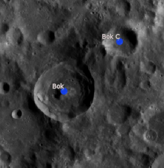 Cráter lunar Bok. Cráteres satélite. (Imagen LRO)